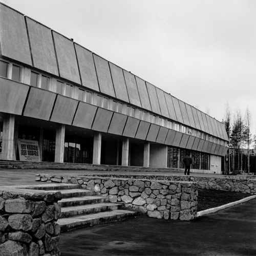 ДК в Новополоцке был построен по проекту Карако В.